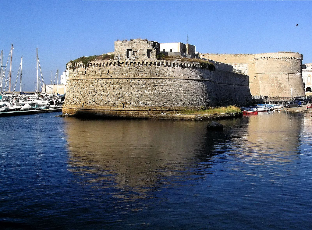 Gallipoli,Puglia, Italia